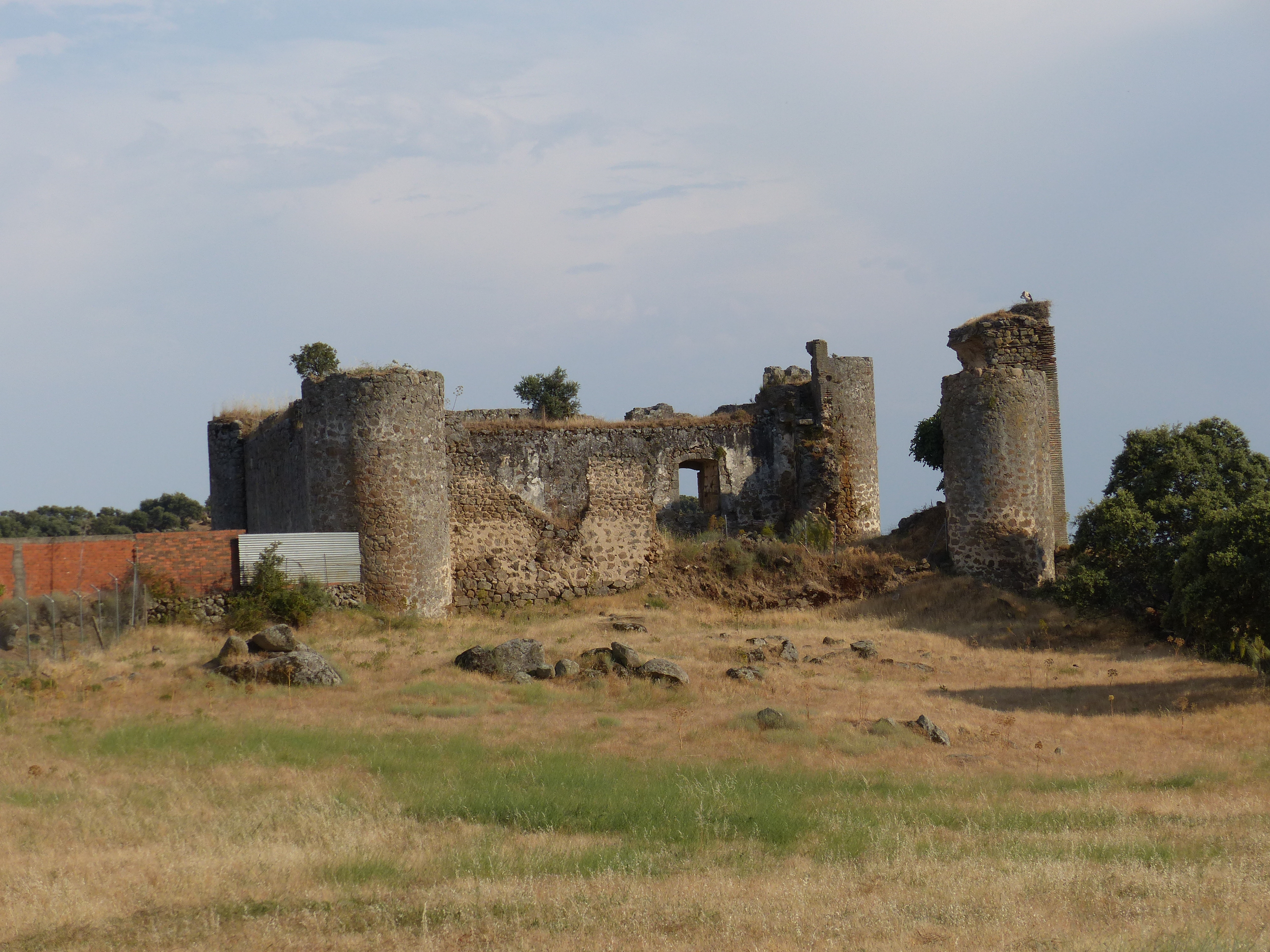 Castillo, Mejorada, Toledo, España